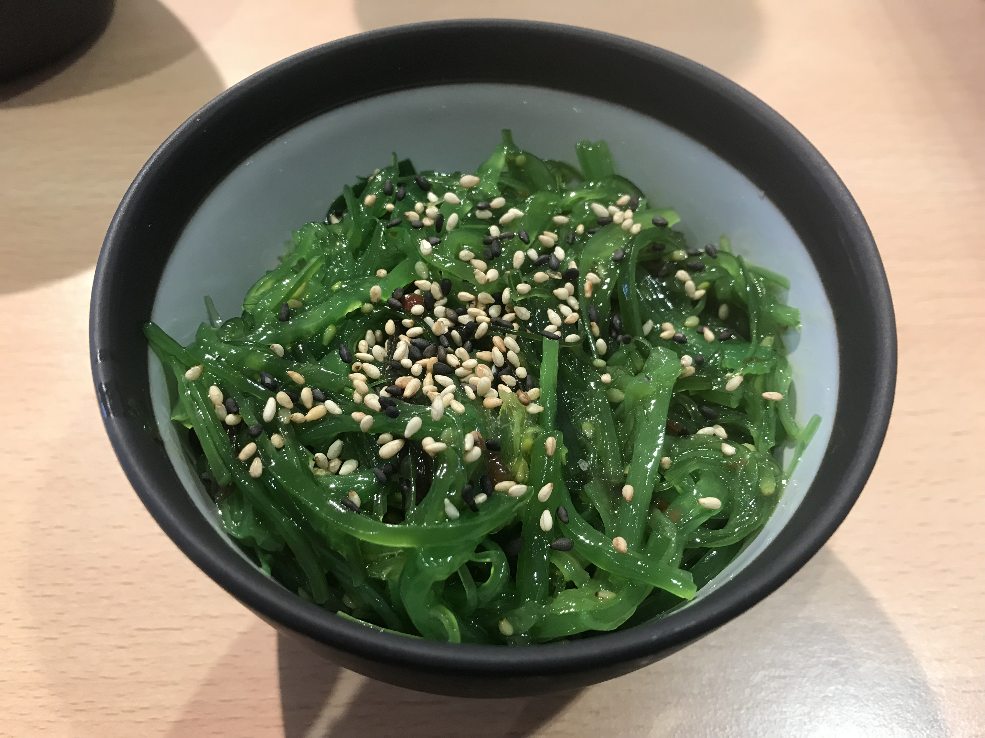 Mika Sushi (Lyon)